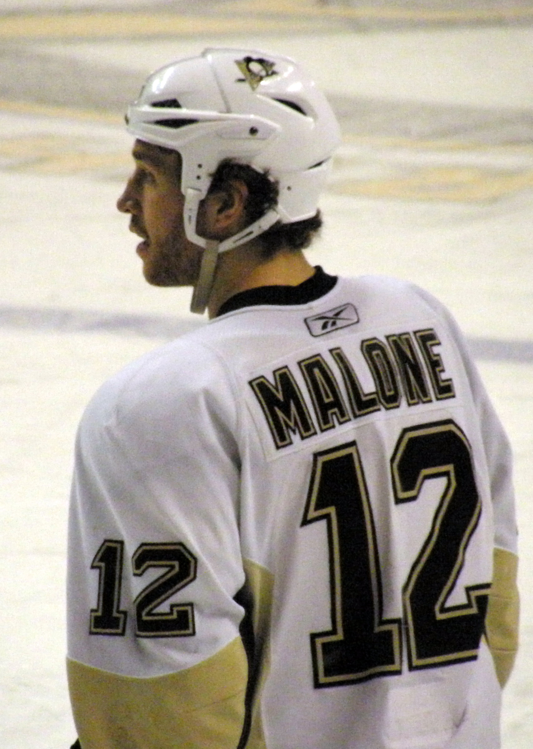 #12 Ryan Malone (RW)